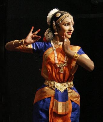 ഭരതനാട്യം